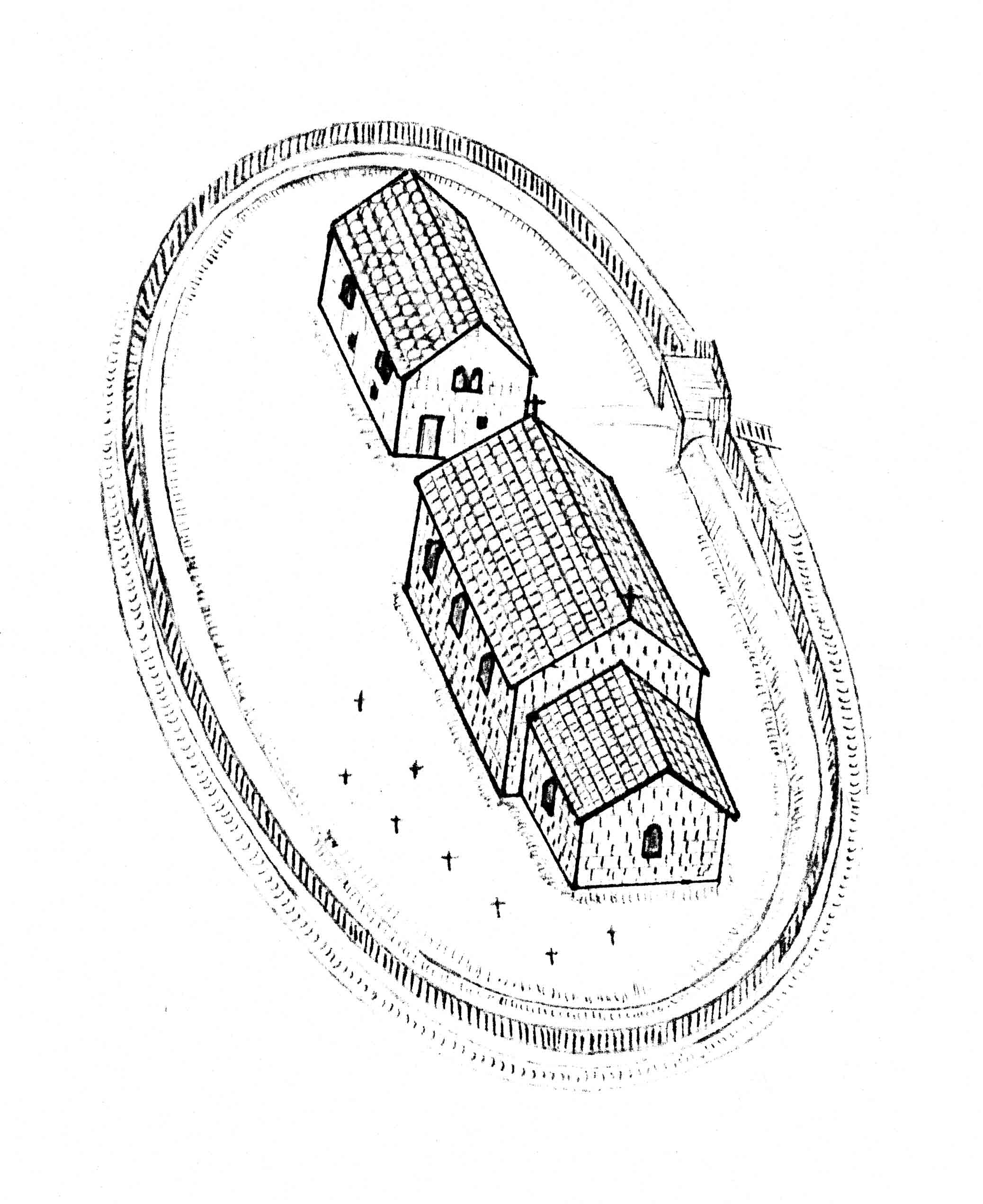 Modell der Kirchenburganlage in Pergkirchen